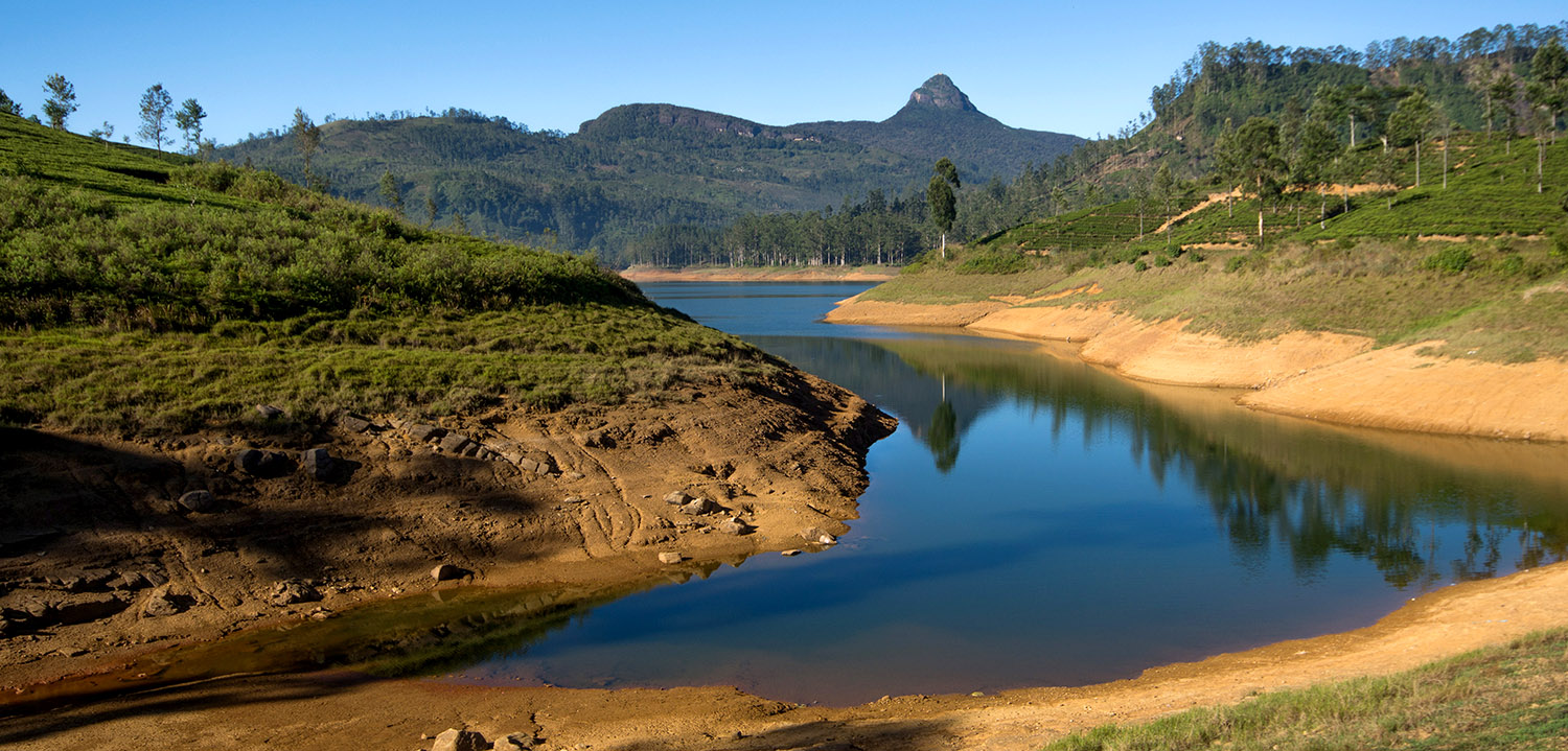 Sri Pada (Adam's peak) view. Sri Lanka.